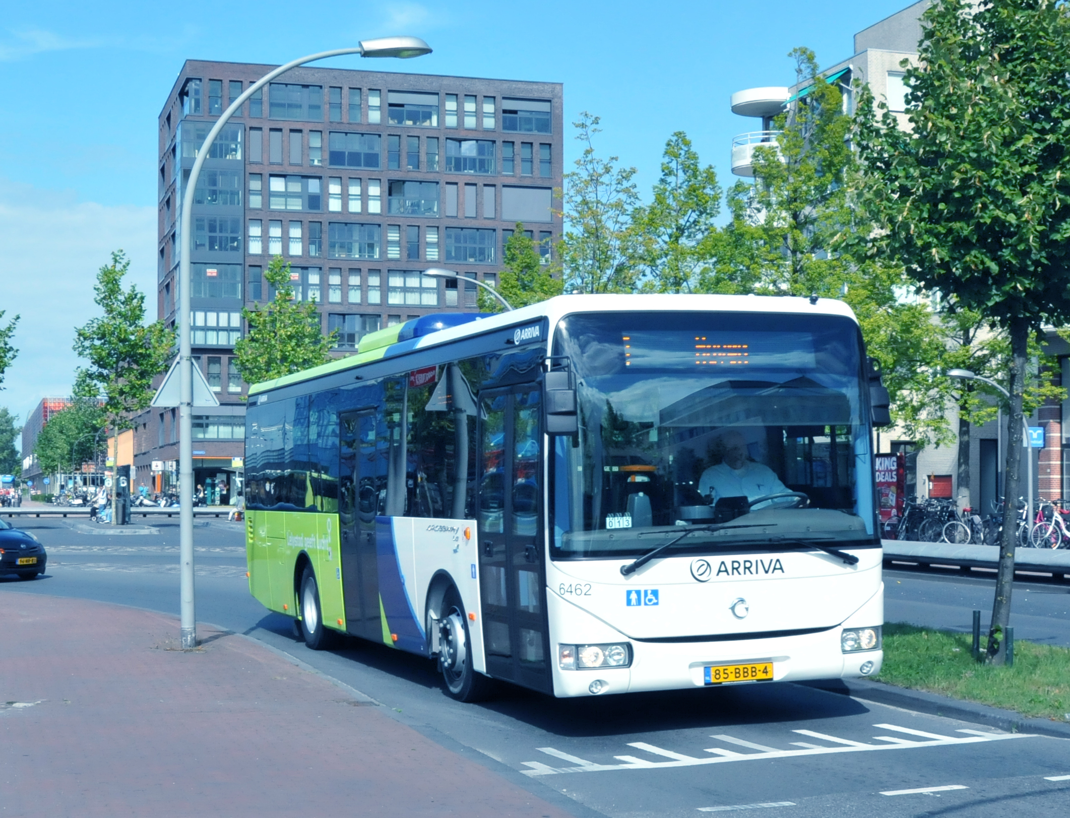 Arriva bus 6462 van het type Irisbus Crossway LE te Lelystad.